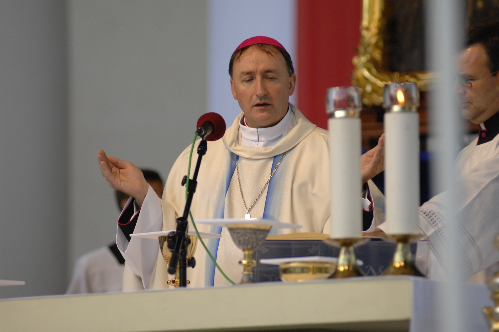 Andrzej Jeż